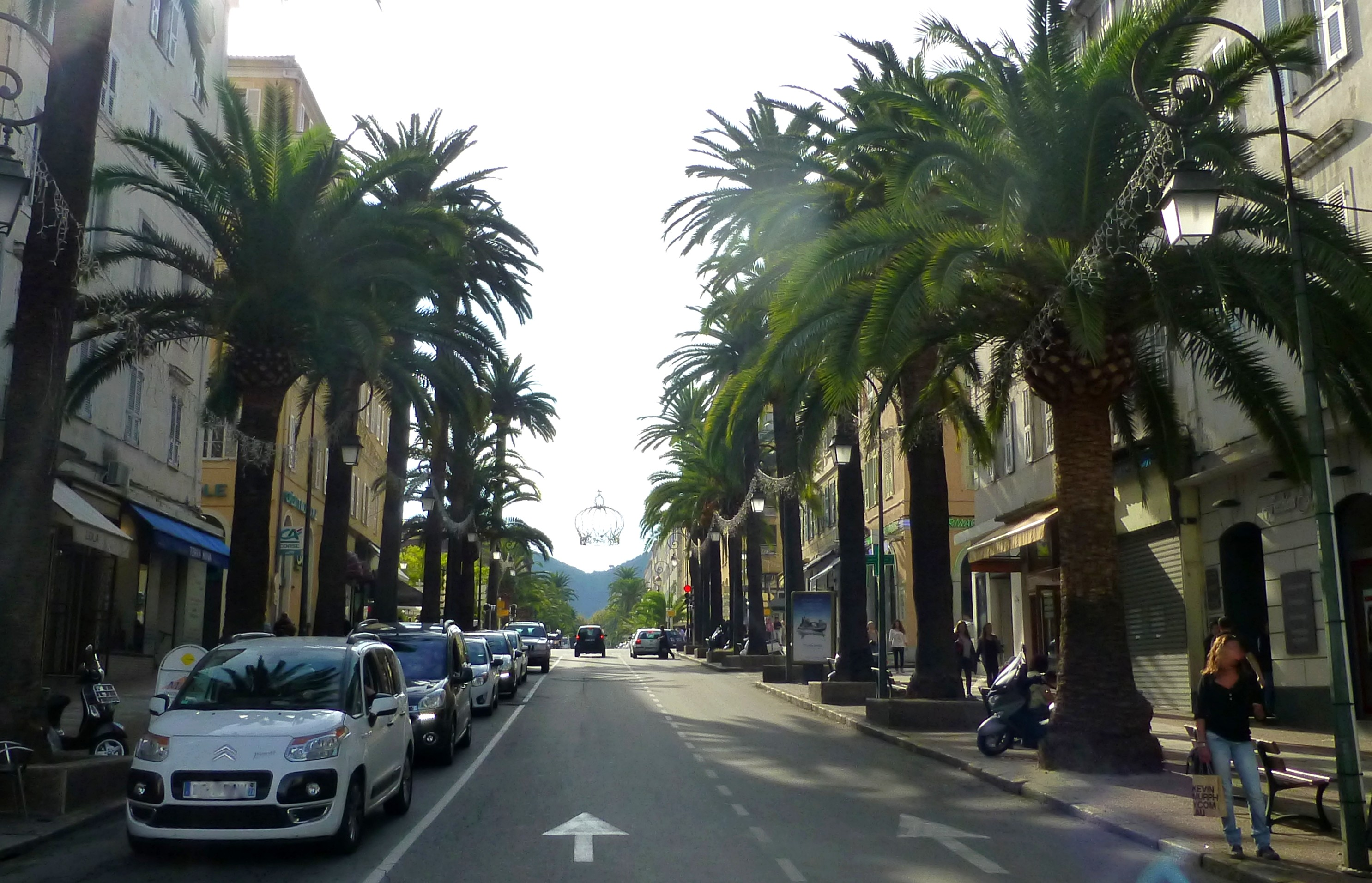 Korsika – Ajaccio – Avenue du Premier Consul